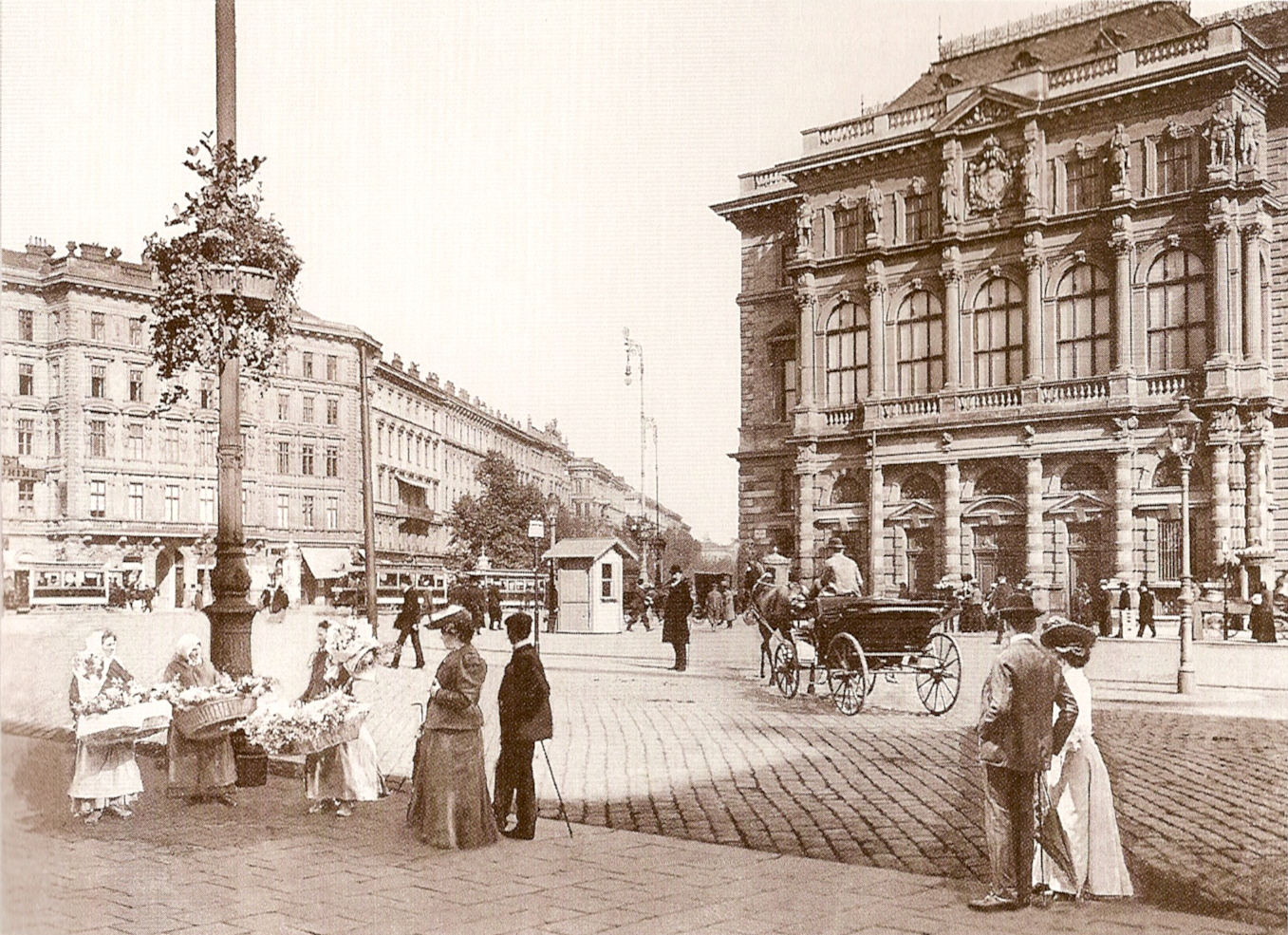 Palais Erzherzog Ludwig Viktor in Vienna/Wien. Fotomontage etwa um 1900. Technik: Kollodiumpapier auf Untersatzkarton.